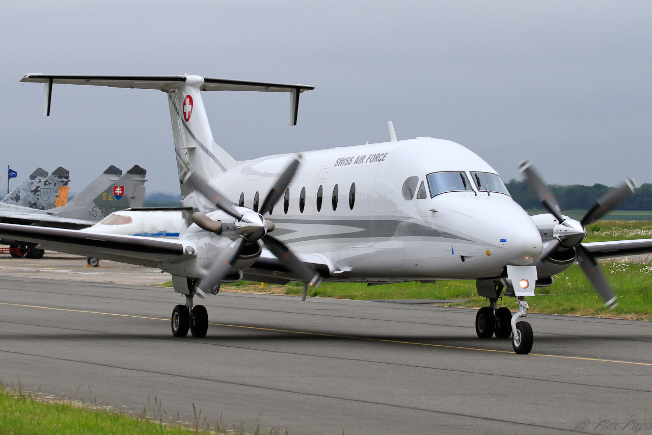 Beechcraft 1900D (Swiss Air Force), 2011 Tiger Meet Cambrai